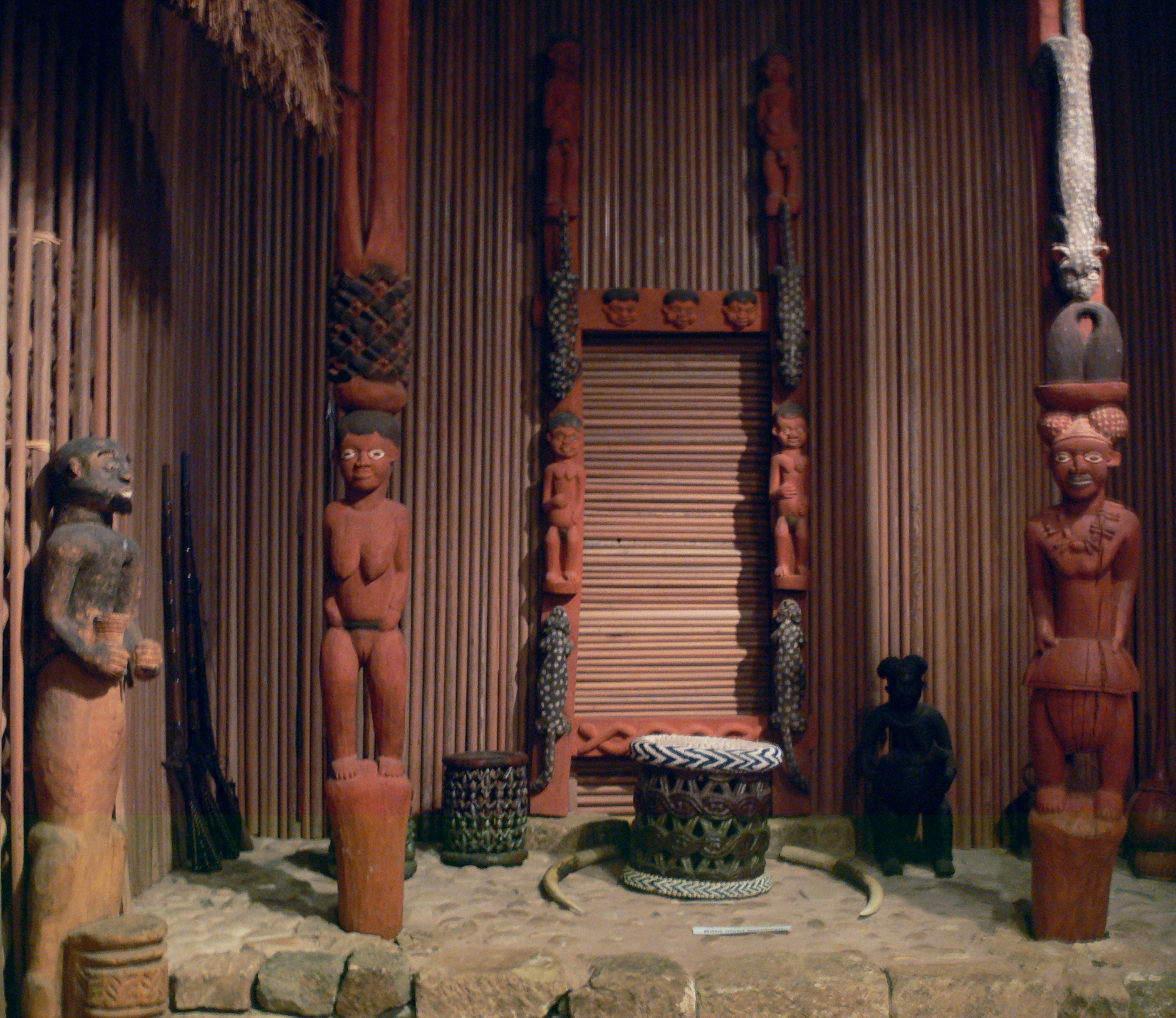 Stuttgart, Linden-Museum Fassade des Palastes des Königs von Oku, Kamerun; 1980 für das Linden-Museum nachgebaut